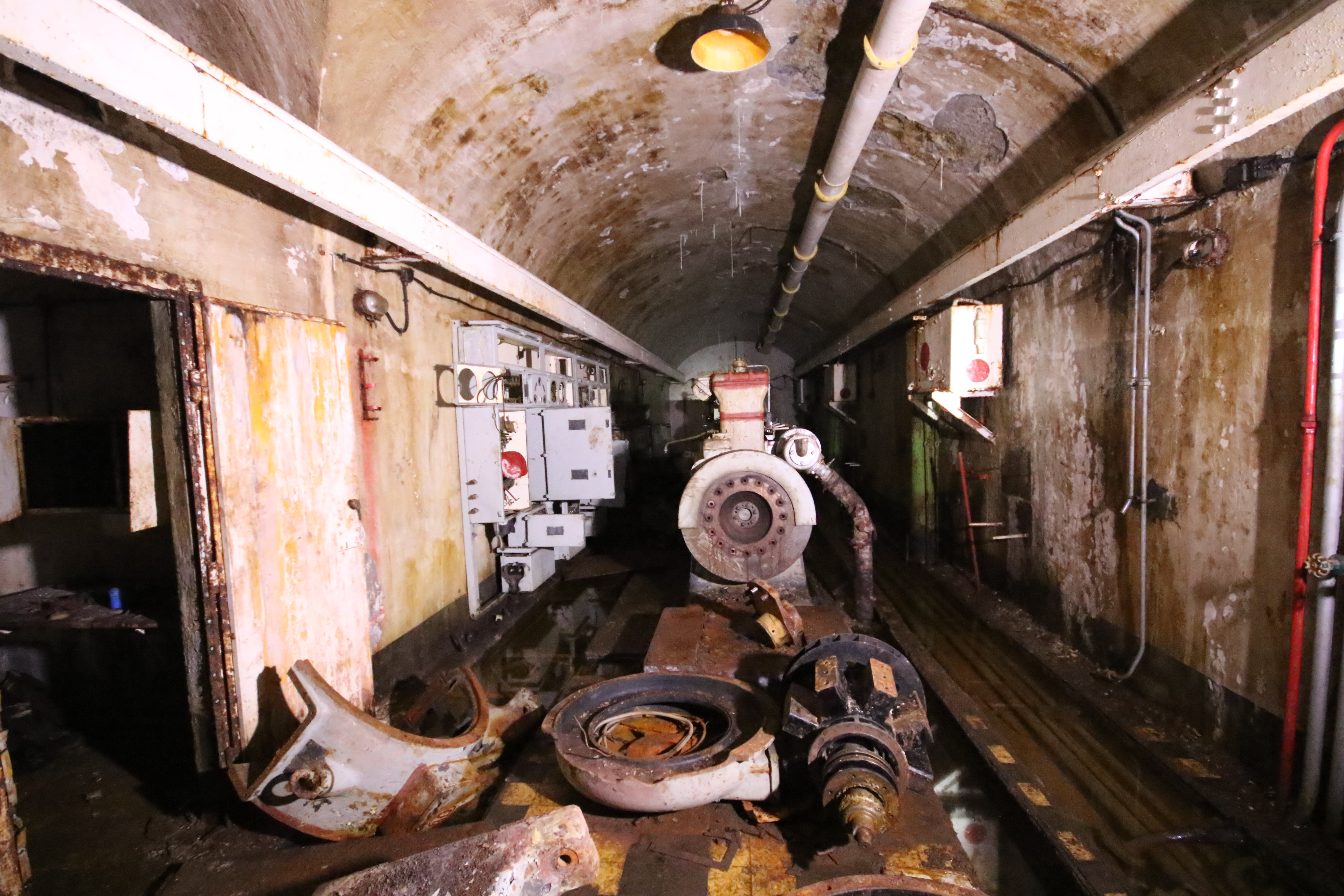 L'Usine électrique de l'ouvrage de Restefond